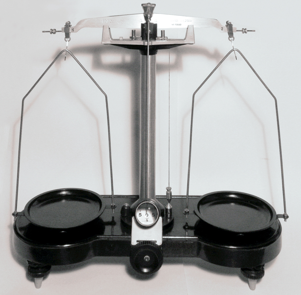 Waga laboratoryjna starego typu, prod. radzieckiej